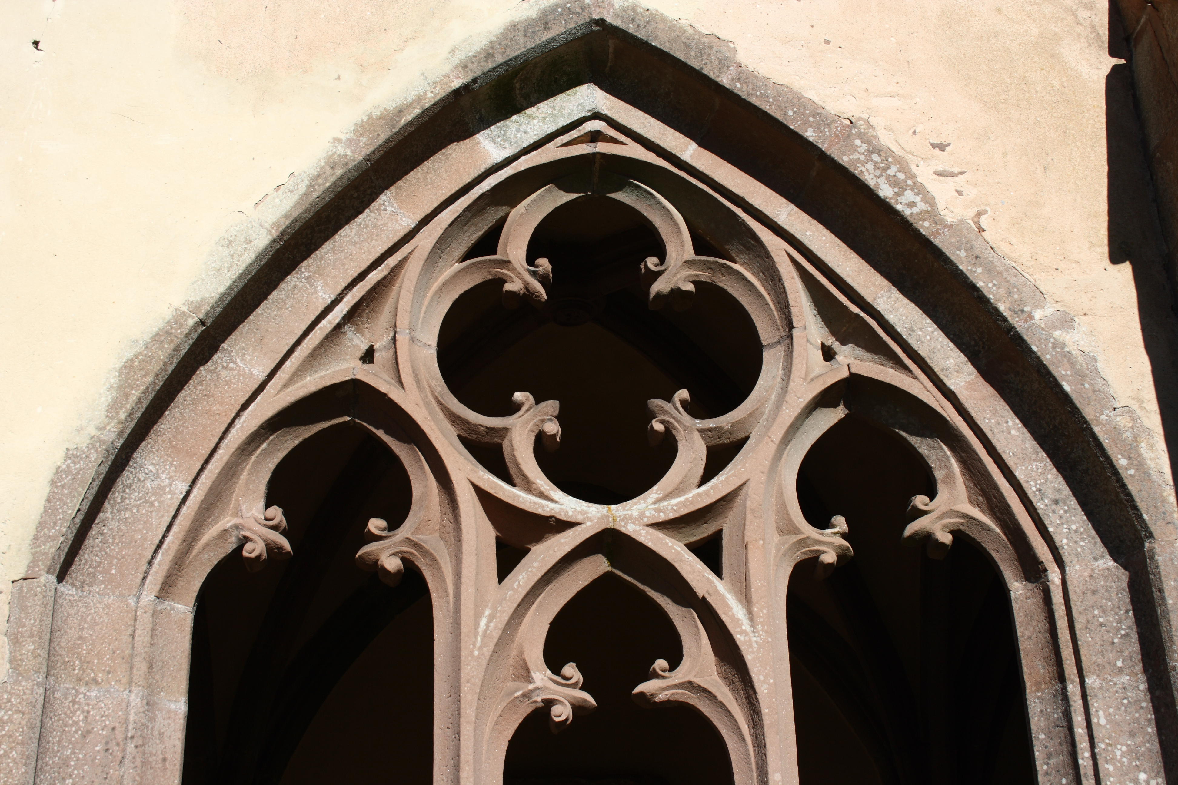 Katholische Pfarrkirche, ehemalige Stiftskirche Unsere Liebe Frau (Mariä Himmelfahrt) in Kyllburg im Eifelkreis Bitburg-Prüm (Rheinland-Pfalz), Kreuzgang aus dem 14. Jahrhundert, Maßwerk